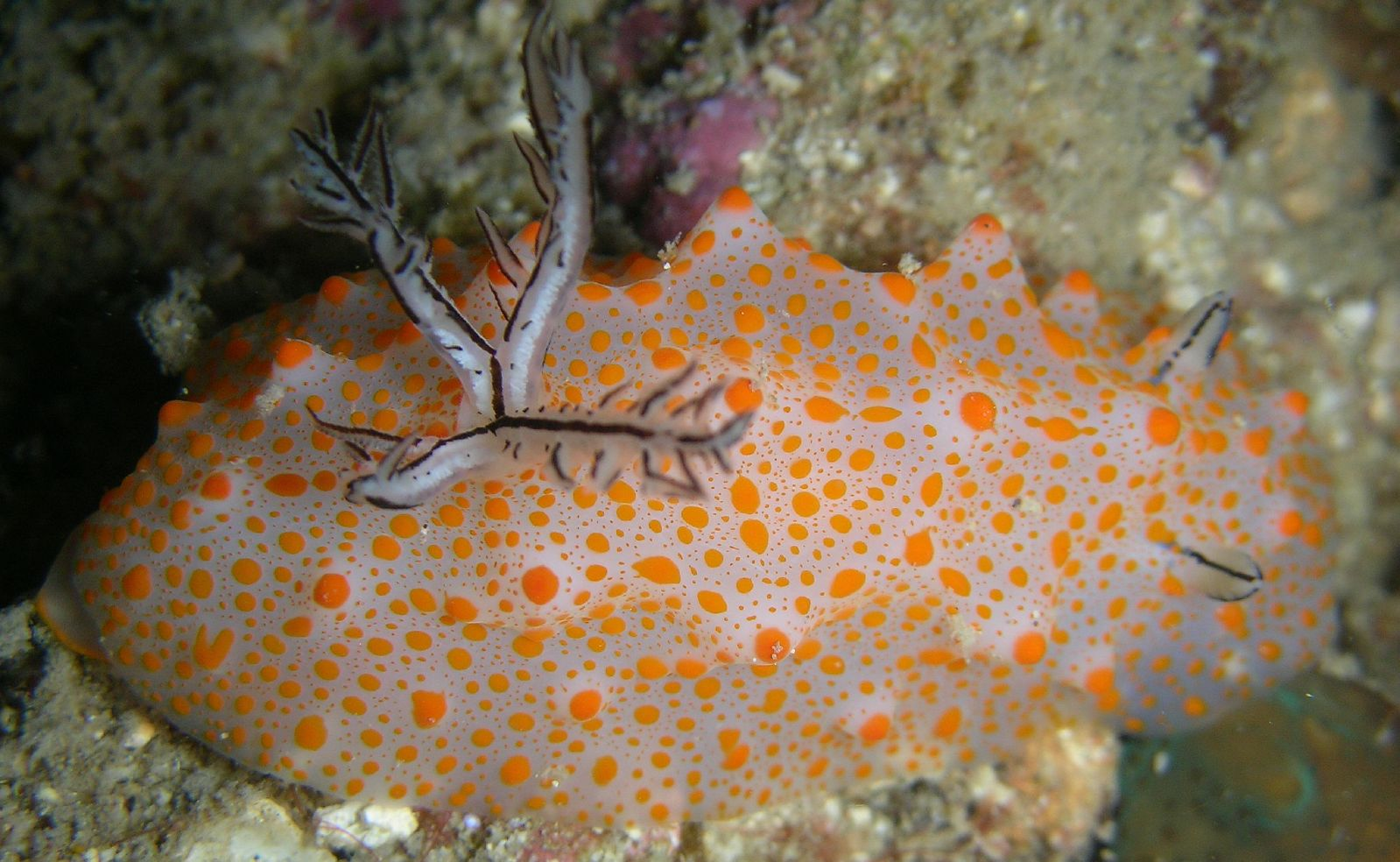 Halgerda stricklandi